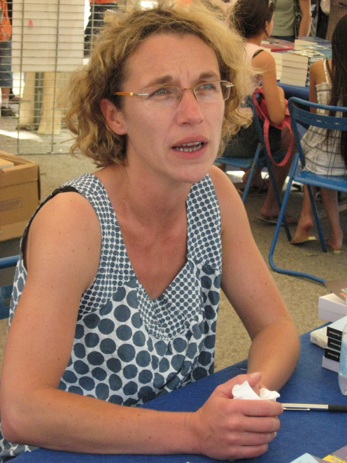 Anne-Laure Bondoux, comédie du livre de Montpellier, 23 mai 2009